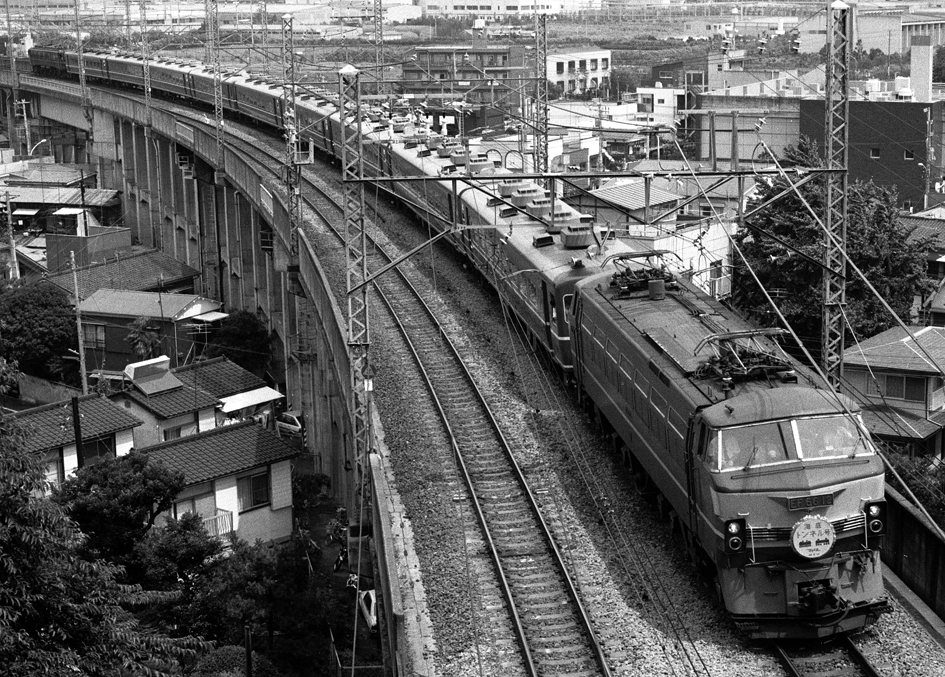 EF66 12けん引「海底トンネル号」（14系座席車+EF58 61）